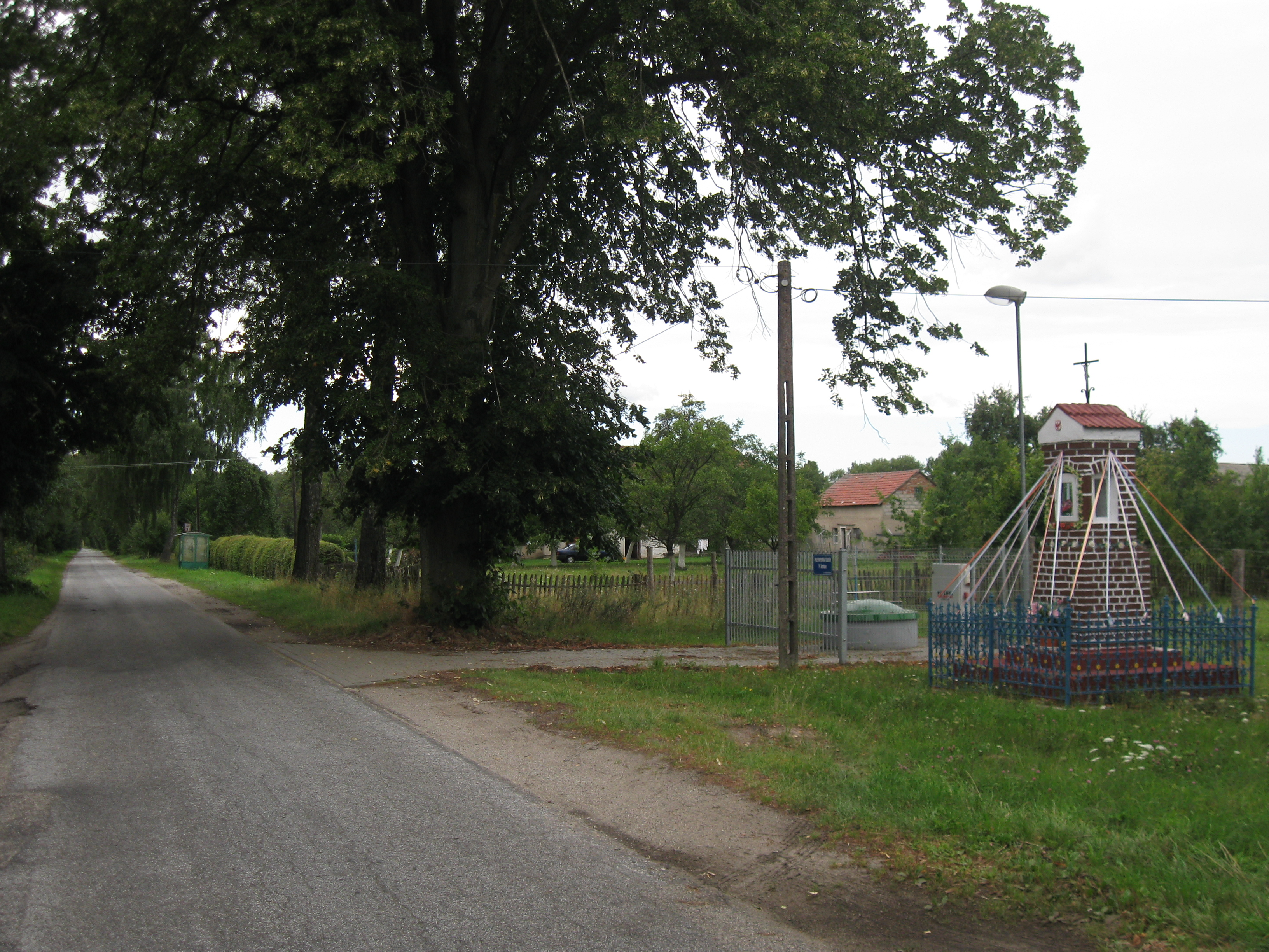 Centrum Drozdówka. Po prawej widoczna kapliczka.